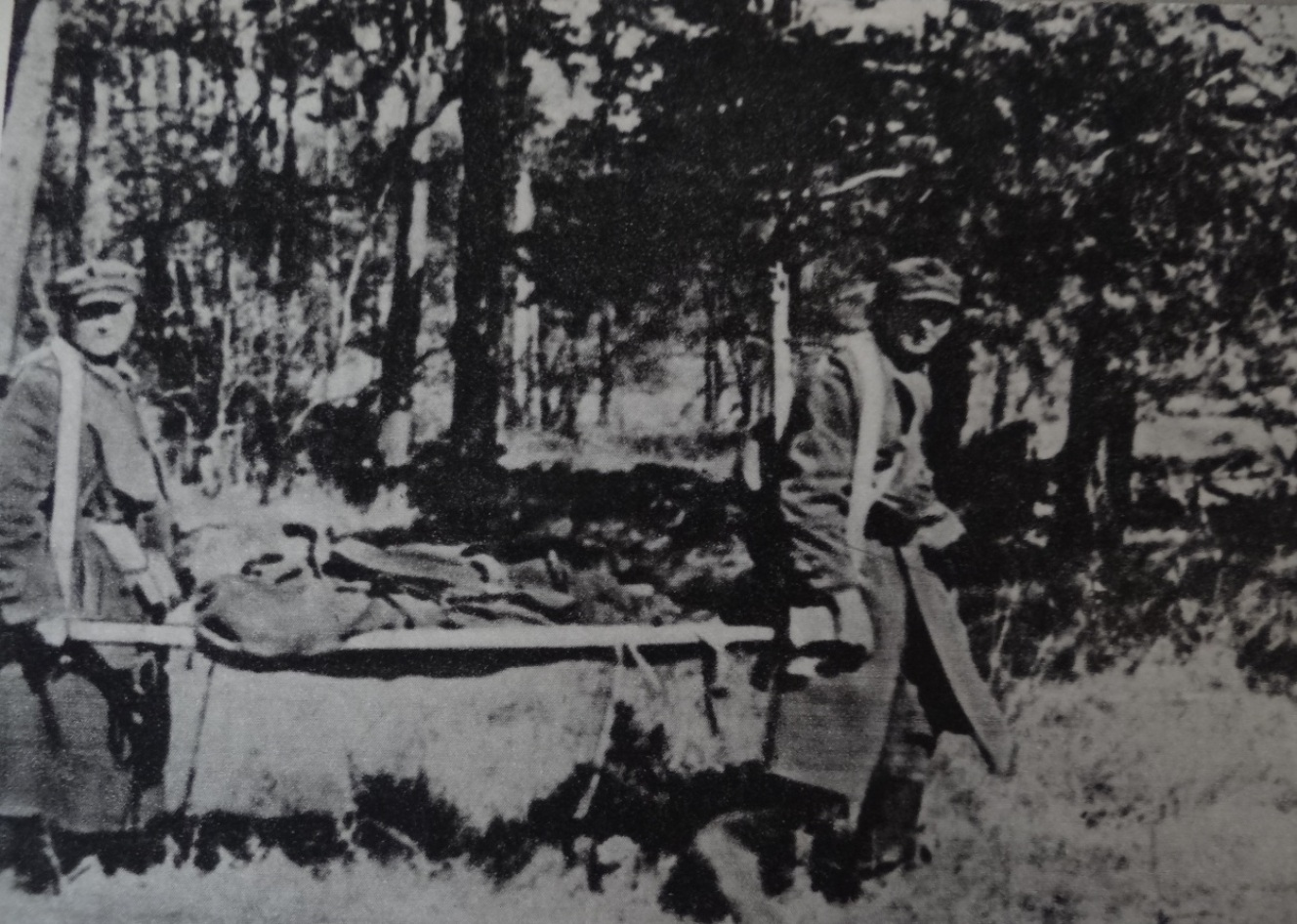 Ruszów, 1945 r. Sanitariusze w rejonie bazy szpitalnej 2 Armii WP, gdzie podczas operacji łużyckiej między innymi funkcjonował 12 PRSzCh